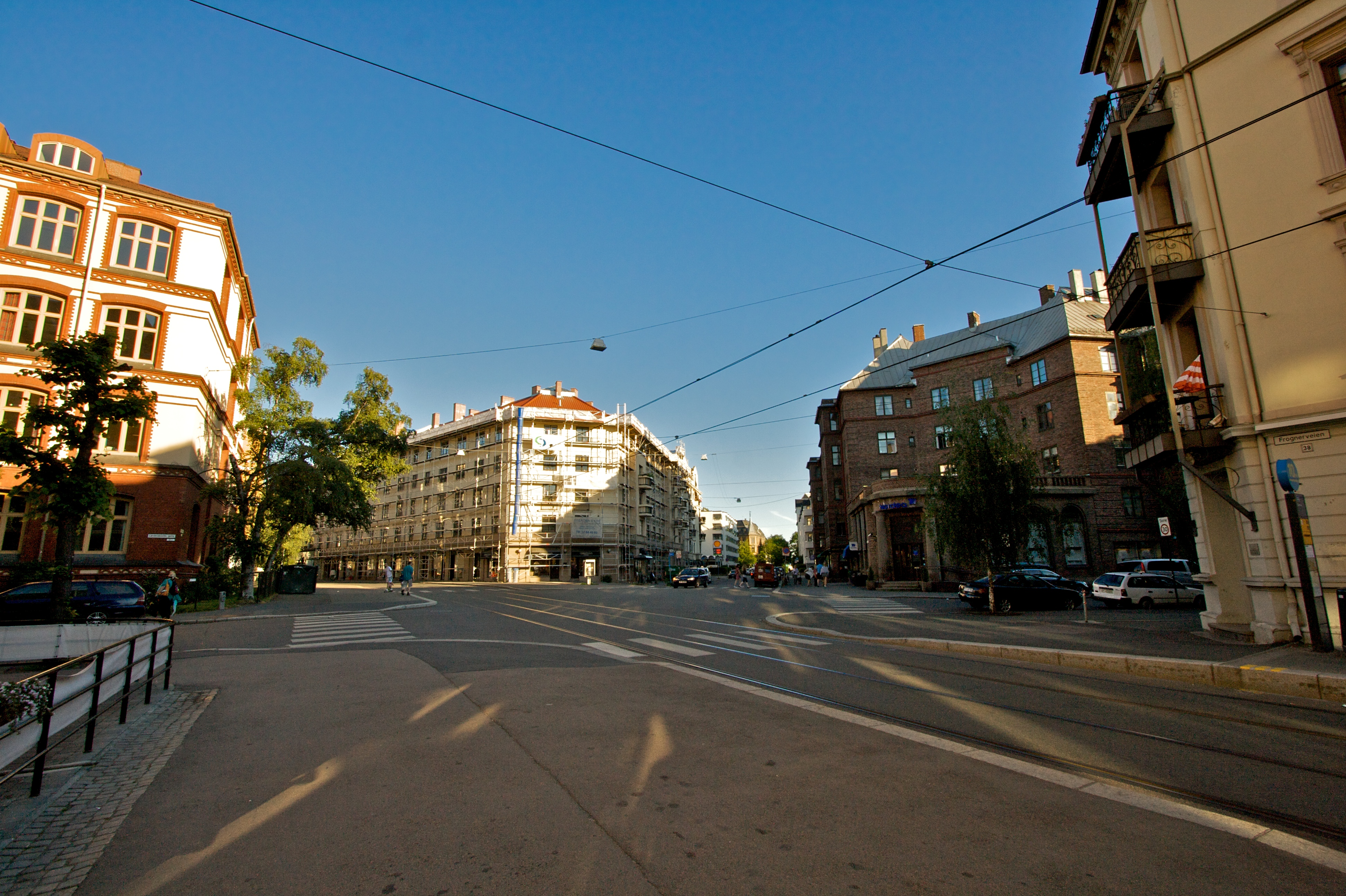 Amtmann Furus plass, Frogner i Oslo.